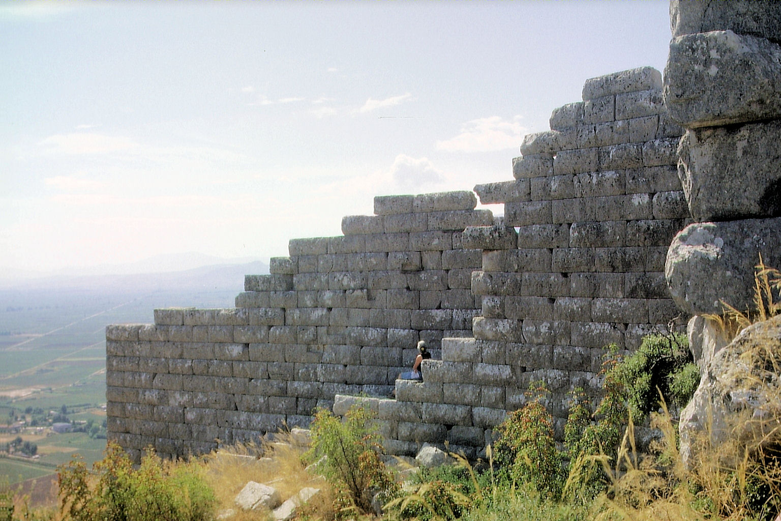 Akropolis von Orchomenos aus Nordwest